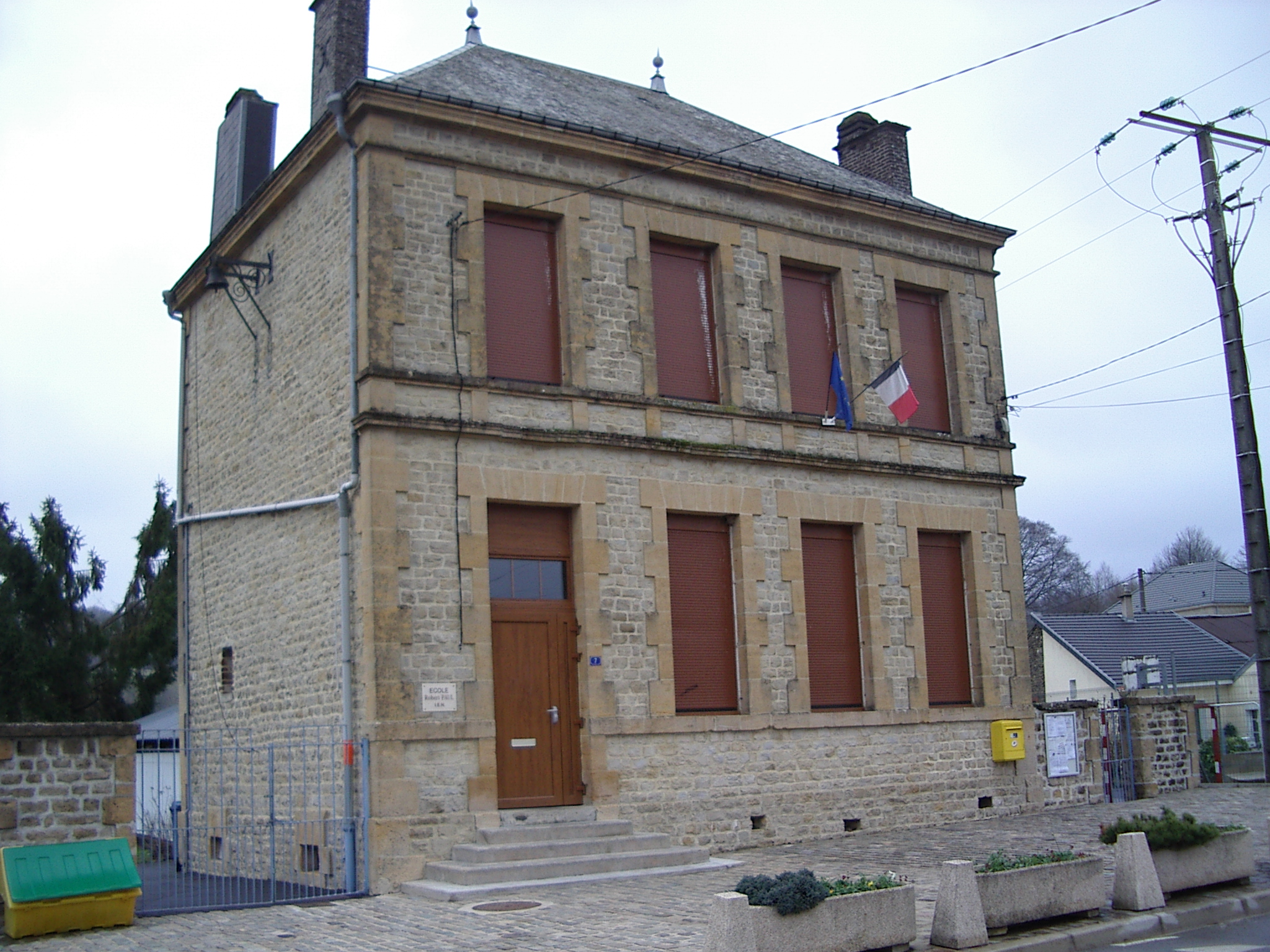 Issancourt et Rumel - Ecole